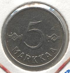 Zelf gescand